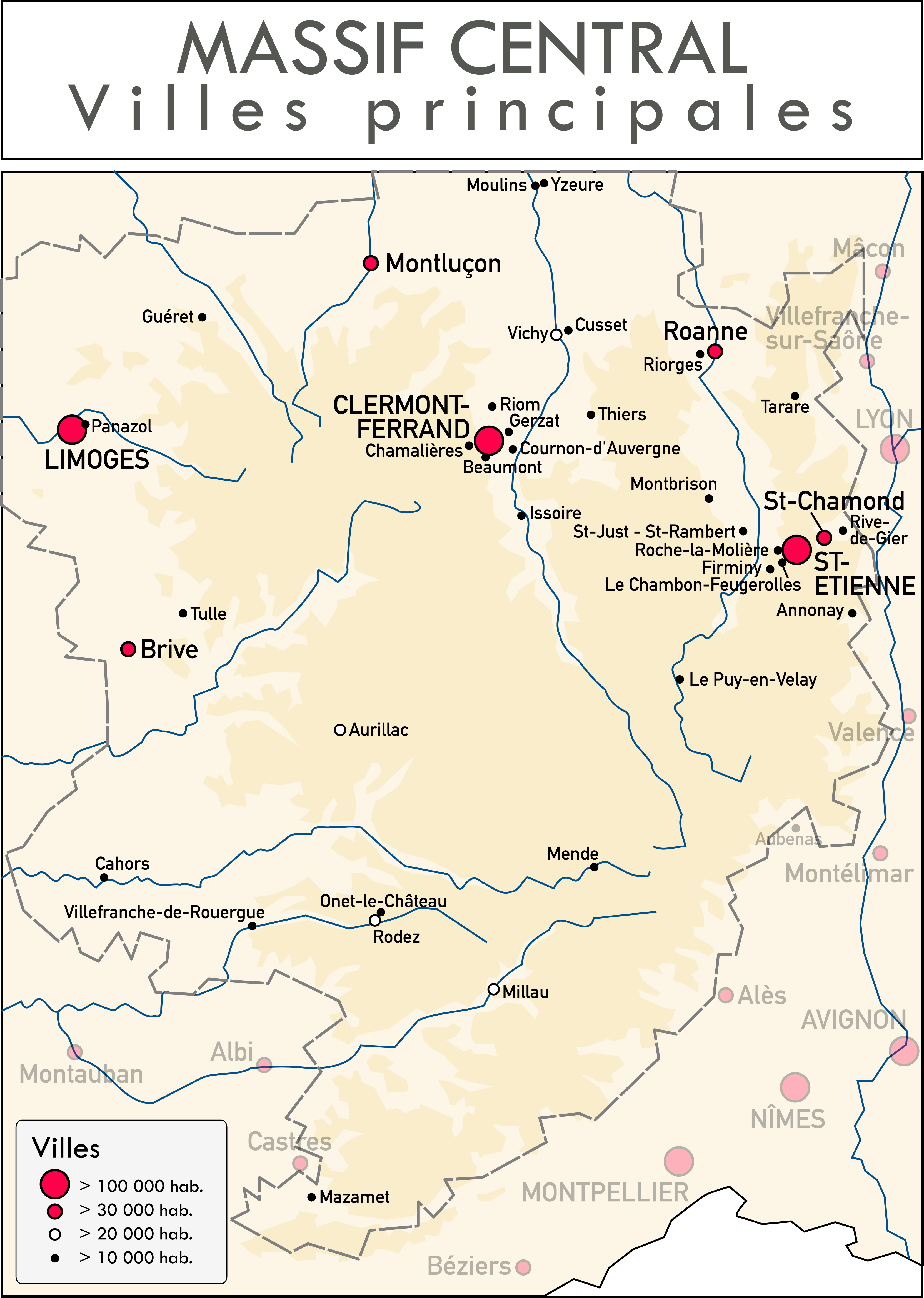 Carte de localisation des communes les plus peuplées du Massif central (pop. 2012).